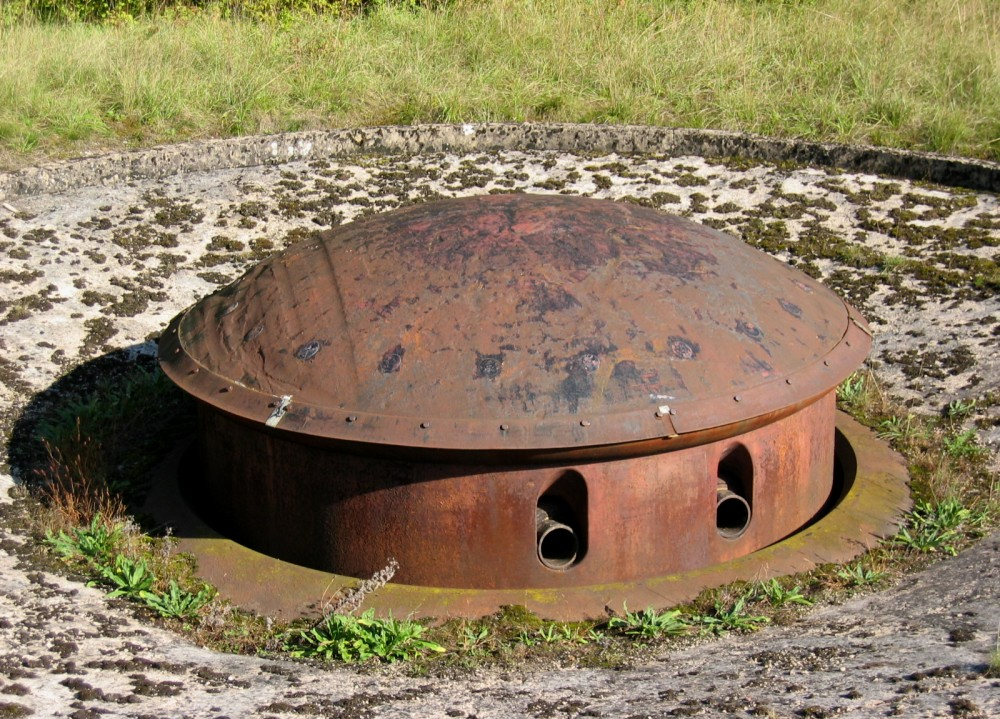 Maginot Line - Ligne Maginot - Gros Ouvrage de Métrich - Tourelle de 135 mm - Bloc 11